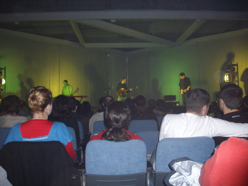 The Radio Dept. Universidade de Vigo 2008